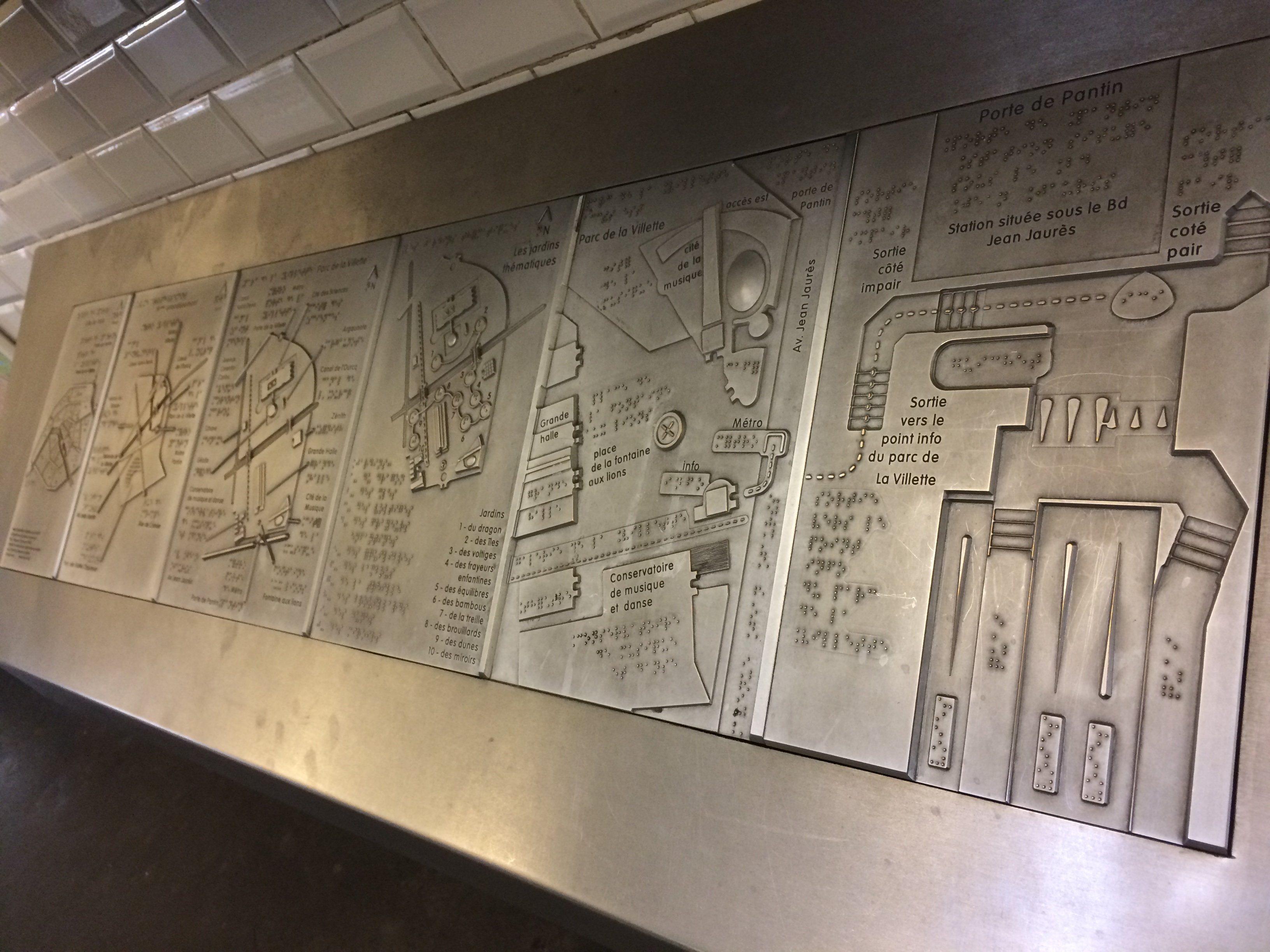 Une table en relief à la station de métro Porte de Pantin à Paris